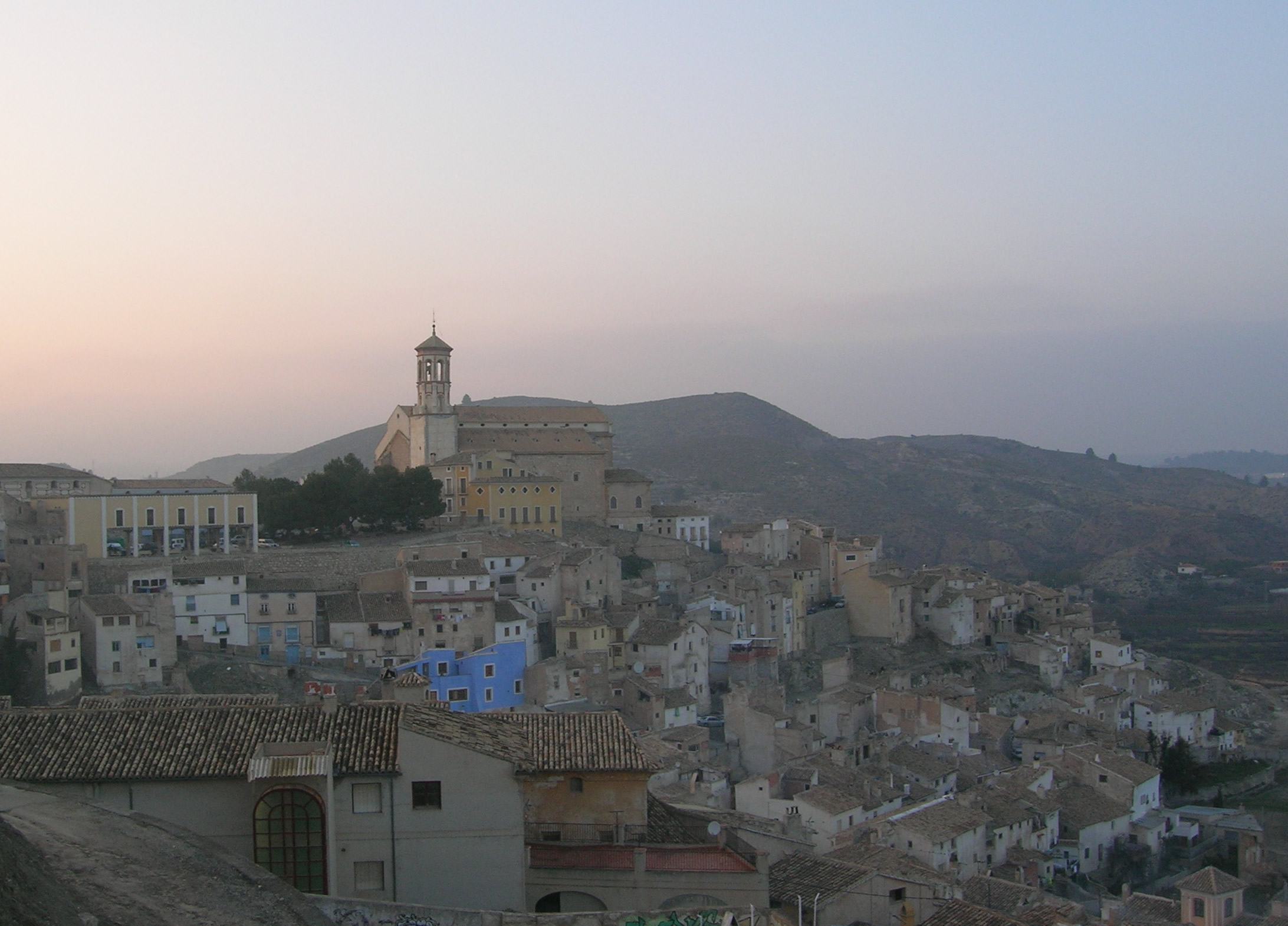 Llegando a la plaza de la Constitución, lugar emblemático y de una gran belleza dentro del casco antiguo de Cehegín, se encuentra la Iglesia de la Magdalena, obra atribuida a Jerónimo Quijano. Es el edificio más destacable dentro del patrimonio religioso ceheginero y el más característico, ya que es el que dibuja la silueta característica de este municipio. Fue declarada bien de interés cultural con categoría de documento por Real Decreto el 2 de julio de 1982. También ha sido declarada Monumento Nacional. Su historia se inicia con las obras en el siglo XVI llegando inconclusa hasta finales del siglo XVII. En el proyecto inicial aparecía una planta basilical de testero recto y utilizando columnas como soporte. Tras la muerte de Quijano en 1576, Ginés de Gea retoma la construcción, ayudado por Pedro Negrete, Alonso Valero y Juan Quintana. Aún así, serían finalmente Francisco Bastida y José García los que se encargaran de terminar la obra en el año 1698. La Iglesia de Santa María Magdalena de Cehegín es uno de los templos más importantes de toda la Región de Murcia. La arquitectura y elementos que la componen hacen de ella una pieza de gran calidad dentro del panorama de la arquitectura religiosa murciana. Con motivo de la relevancia y perfección de algunos de los objetos que alberga en su interior, se decidió hace ya casi cuatro décadas crear un museo dentro del templo. Dicho museo está constituido por la propia iglesia en sí, y las obras más importantes que contiene, tanto en el campo de la arquitectura, la escultura y la pintura. Algunas de ellas datan del siglo XVI. Un espacio singular, que encierra una gran religiosidad, pero que ha sabido adaptarse a las nuevas tendencias del turismo cultural de calidad que destaca en la Región de Murcia.